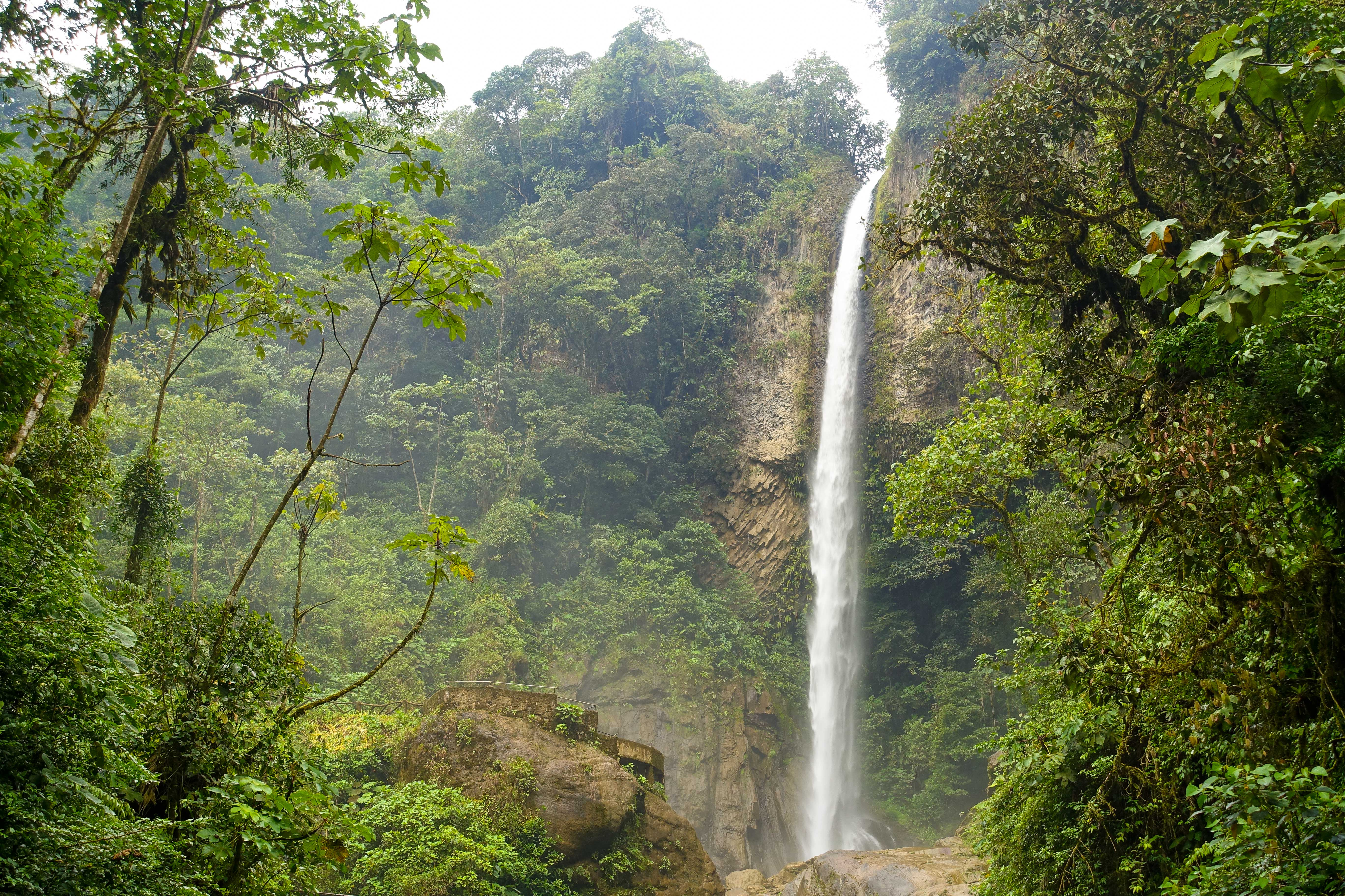 Wasserfall Machay, Pastaza-Tal zwischen Río Verde und Río Negro